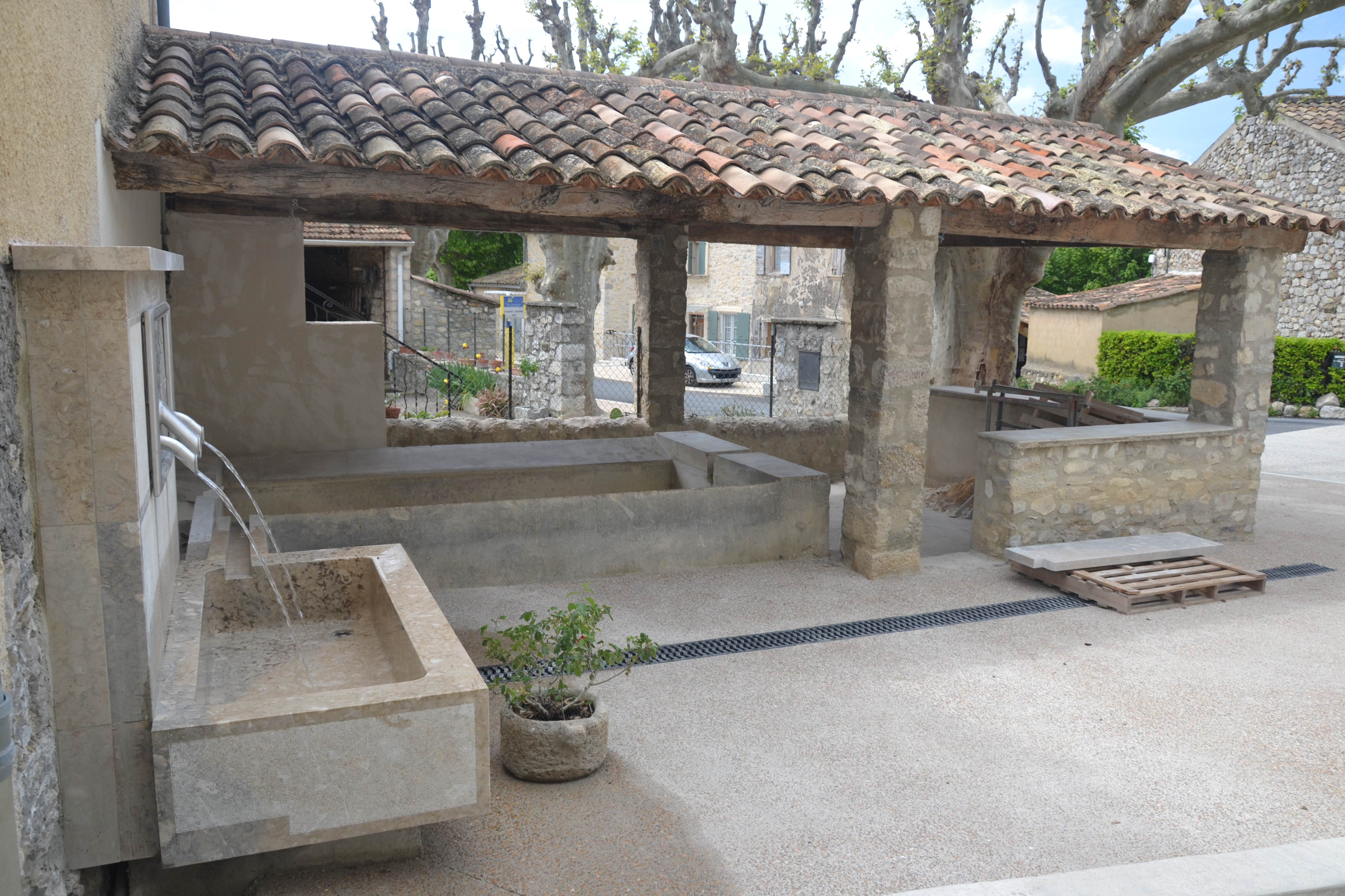 Fontaine et lavoir à Saint-Sauveur-Gouvernet